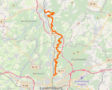 Streck vum Uelzecht-Pad